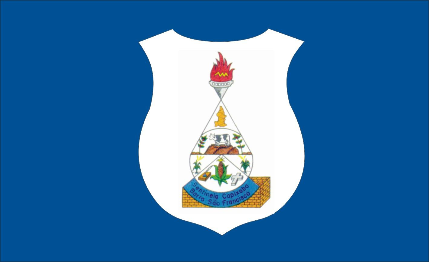 Bandeira da cidade de Barra de São Francisco, ES, Brasil